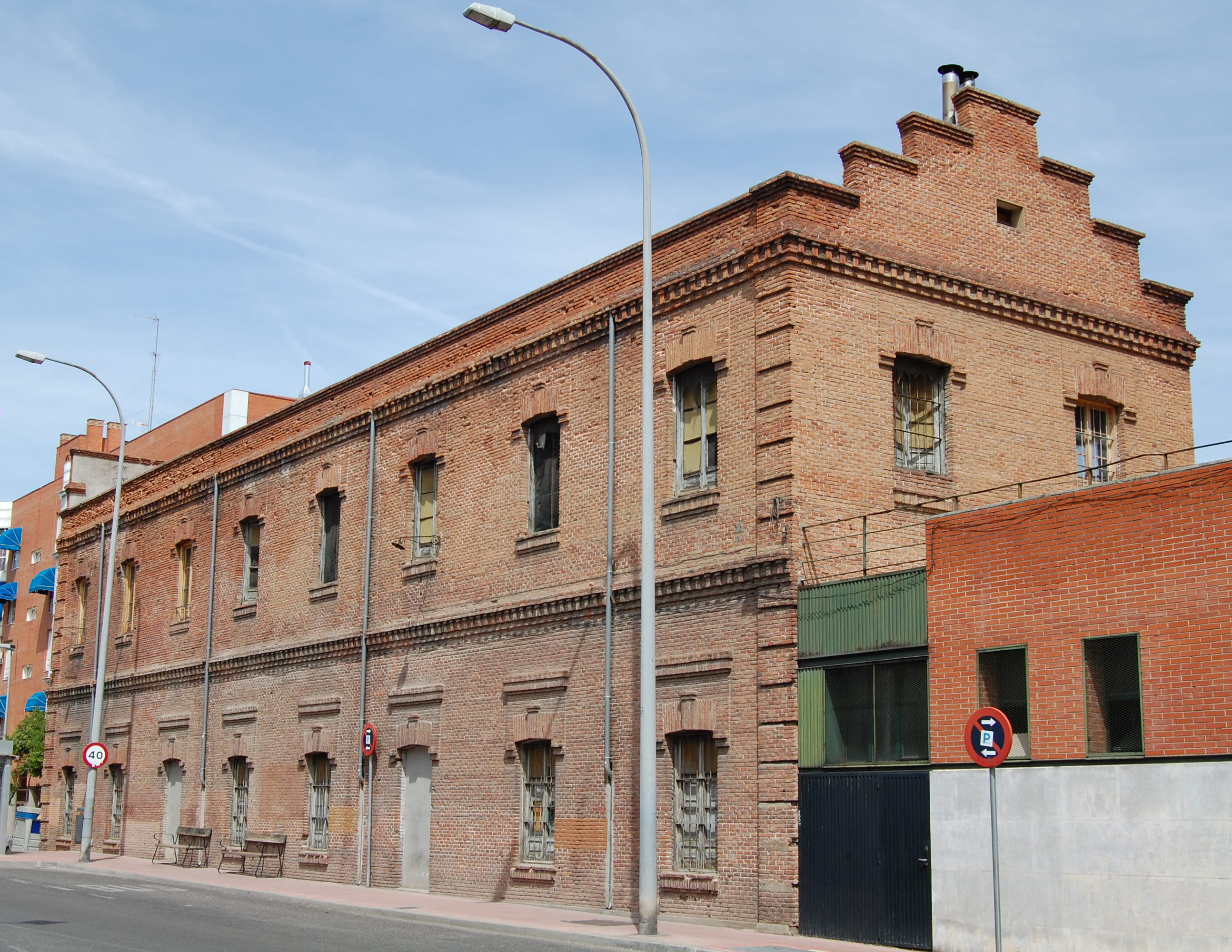 Fachadas sur y oeste de la antigua Fábrica de harinas "La Esperanza" en Alcalá de Henares (Comunidad de Madrid - España). Fundada por Sergio Real Hernández en 1916; actualmente incluida en el Catálogo del Patrimonio Industrial de España. Edificio de ladrillo y arquitectura neomudéjar, del constructor madrileño Martín Lago.[1]